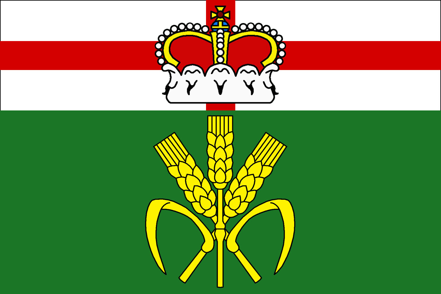 vlajka obce Úpohlavy